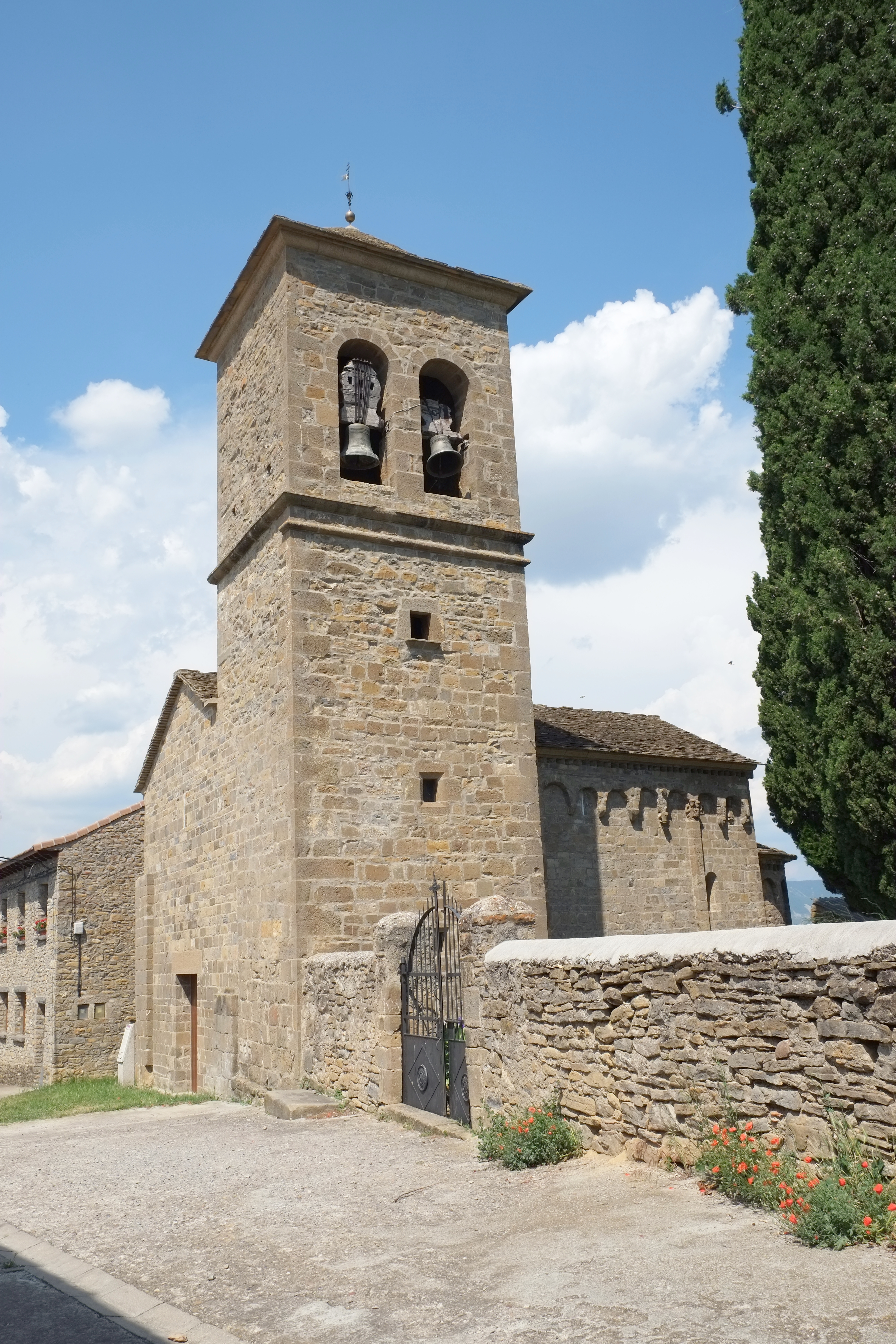 Kirche San Fructuoso in Barós in Aragonien (Spanien)